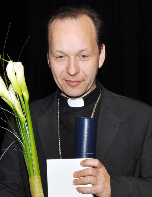 Jozef Haľko (mladší)